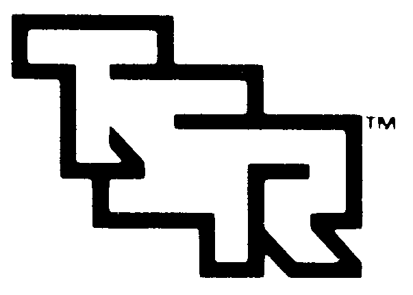 Logo (1982-1991) des ehemaligen Unternehmens TSR (Tactical Studies Rules)